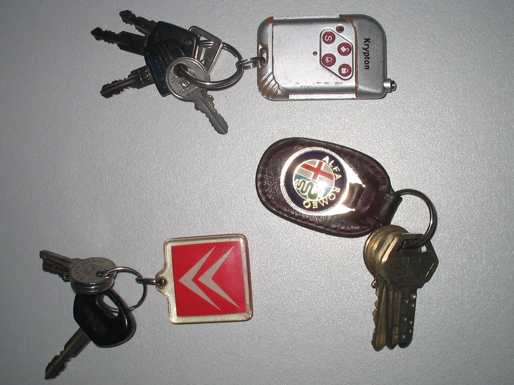 aantal sleutelhangers Categorie:Wikipedia:Afbeeldingen/Gebruiker:Michiel1972